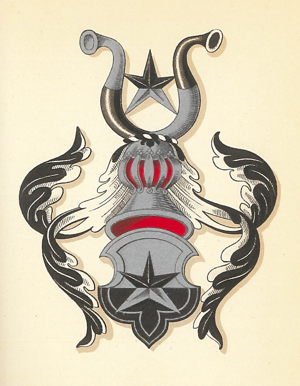 Tordenstierne eller Lysters våbenskiold